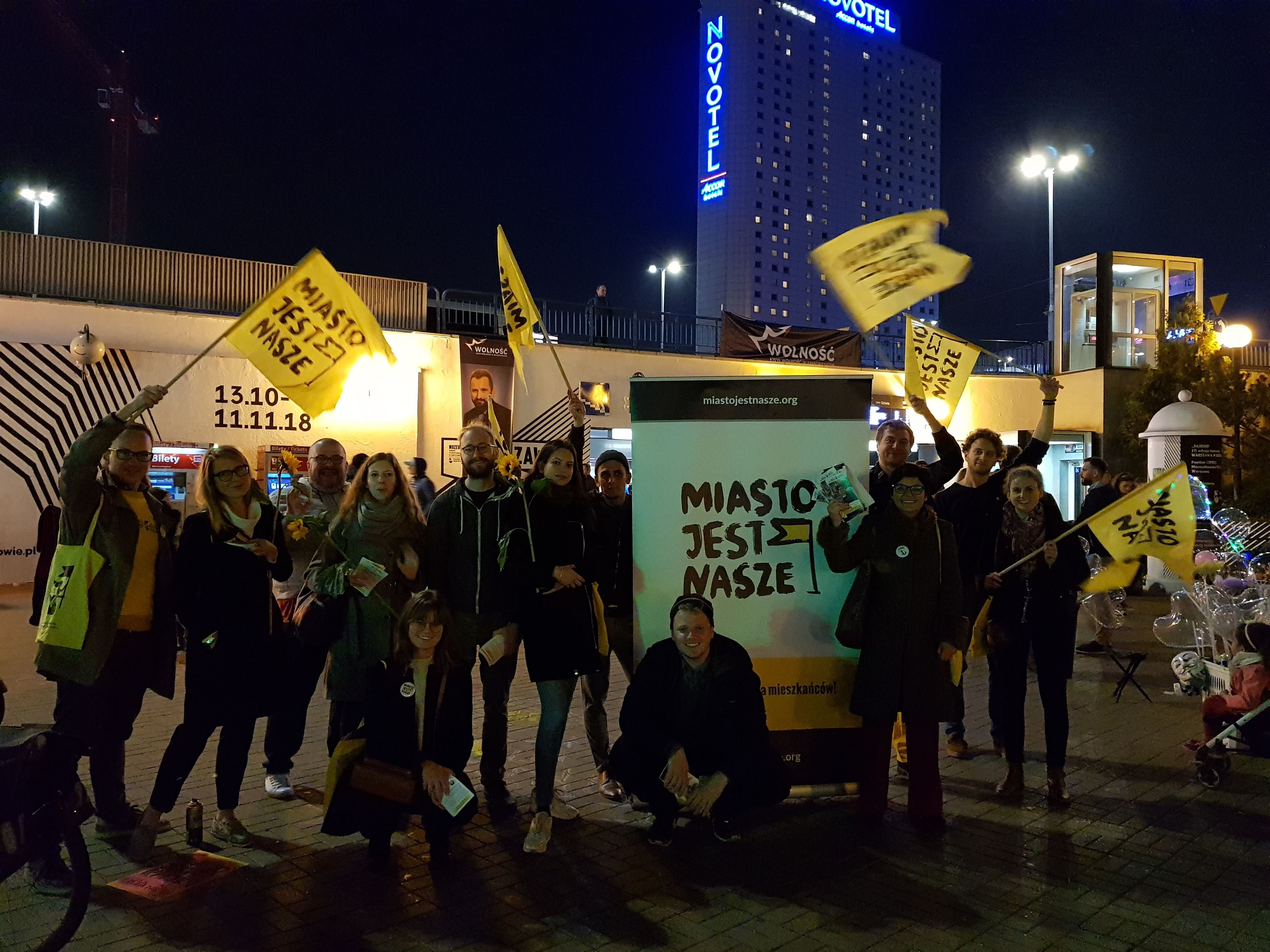 Ostatni wieczór kampanii wyborczej MJN w 2018. Po prawej przy banerze Justyna Glusman.